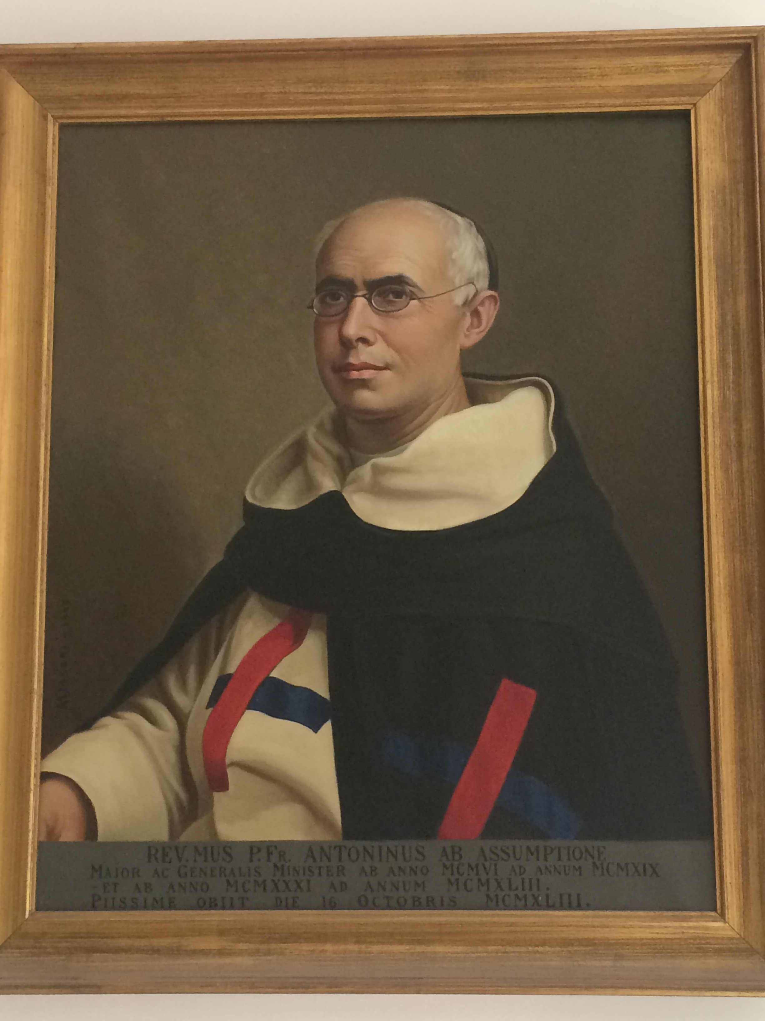 77º Ministro General OSST